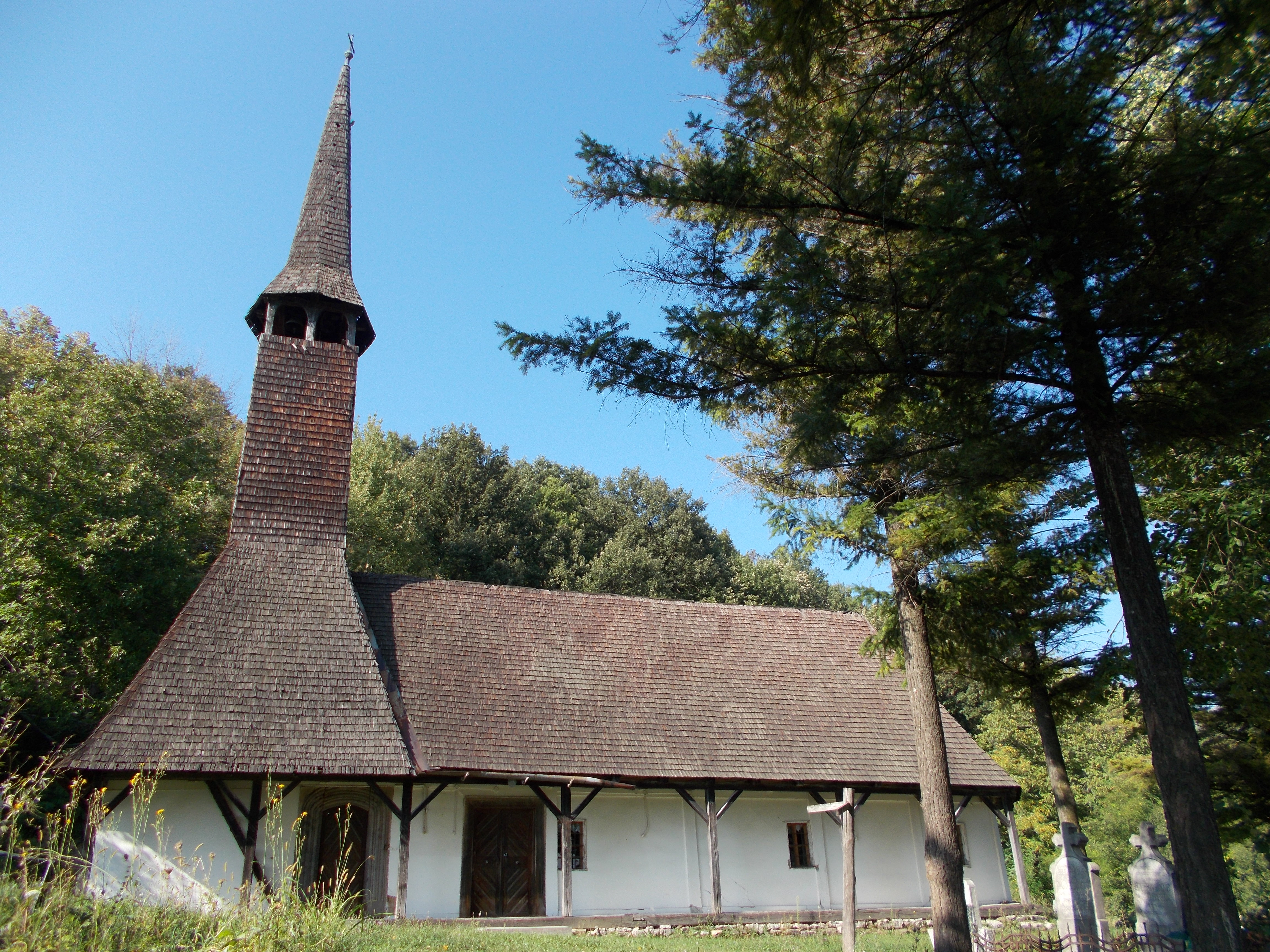 Biserica de lemn "Buna Vestire" din satul Peștiș, județul Bihor